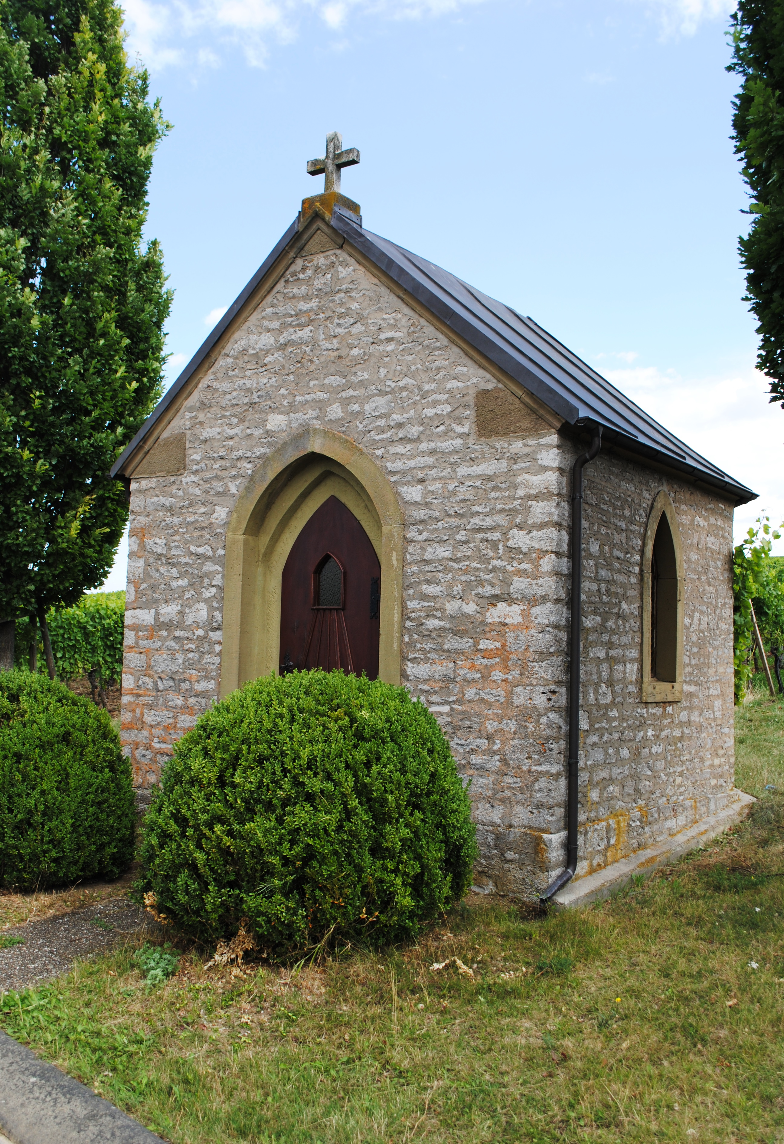 Feldkapelle, Kreuz-Kapelle, Nordheim am Main, kleiner Werksteinbau mit polygonalem Chorabschluss und spitzbogigen Fenster- und Türöffnungen, 19. Jh.; Kapellenweg.